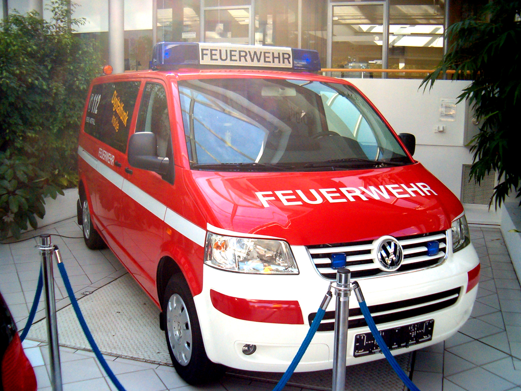 T5 von Volkswagen - Als Feuerwehrwagen (Aufgenommen: September 2005)